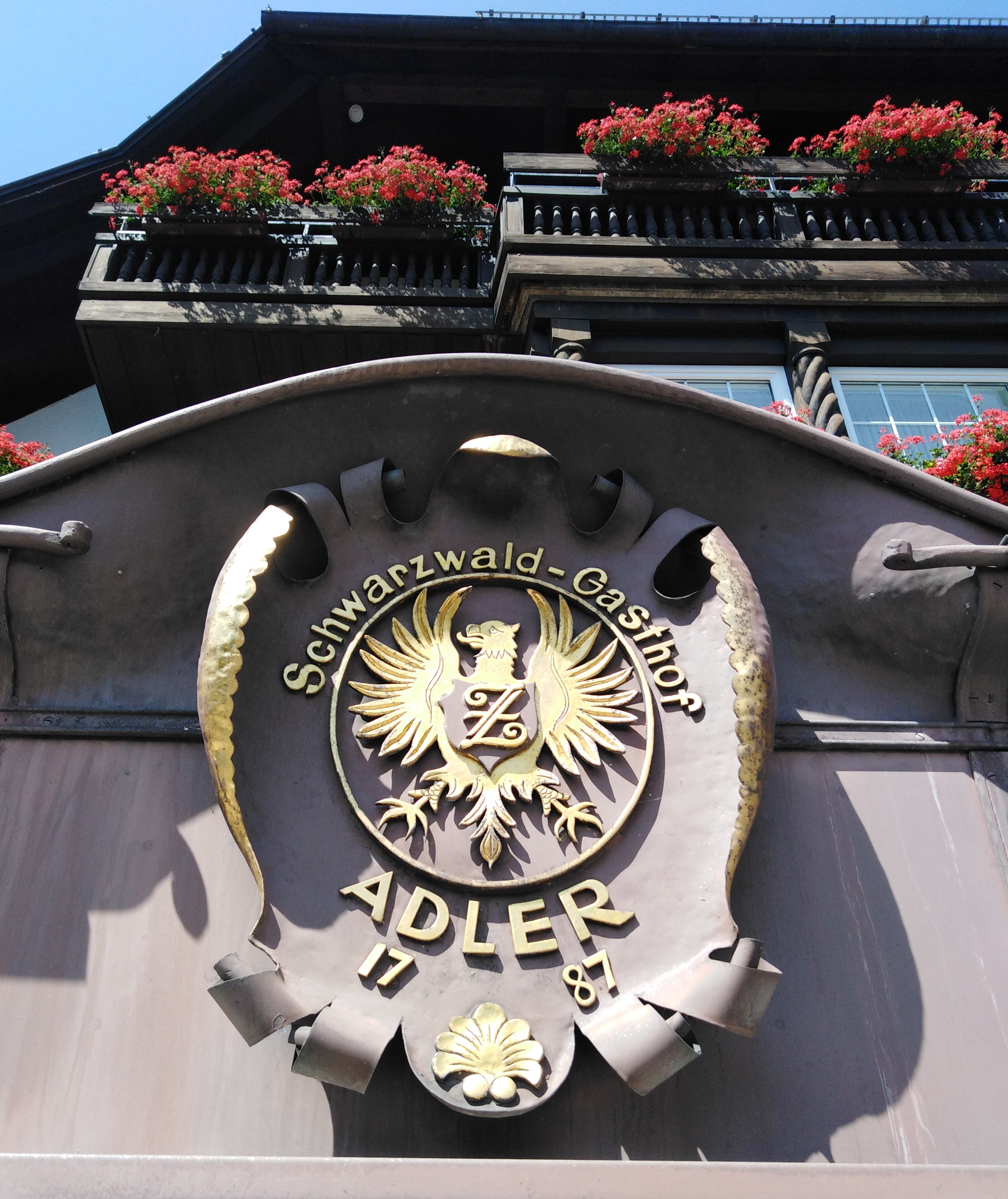 Gasthof Adler in der Gemeinde Häusern im Landkreis Waldshut in Baden-Württemberg im Südschwarzwald. Wappen der Eigentümerfamilie (“Z” = Zumkeller) mit Datum der Realrecht-Verleihung (1787) an den seit 1596 als Tafernwirtschaft geführten Gasthof. Seit 1966 wird das Restaurant Adler Häusern mit einem Michelin Stern ausgezeichnet. Es gilt als das älteste, seitdem kontinuierlich ausgezeichnete Sternerestaurant Deutschlands.